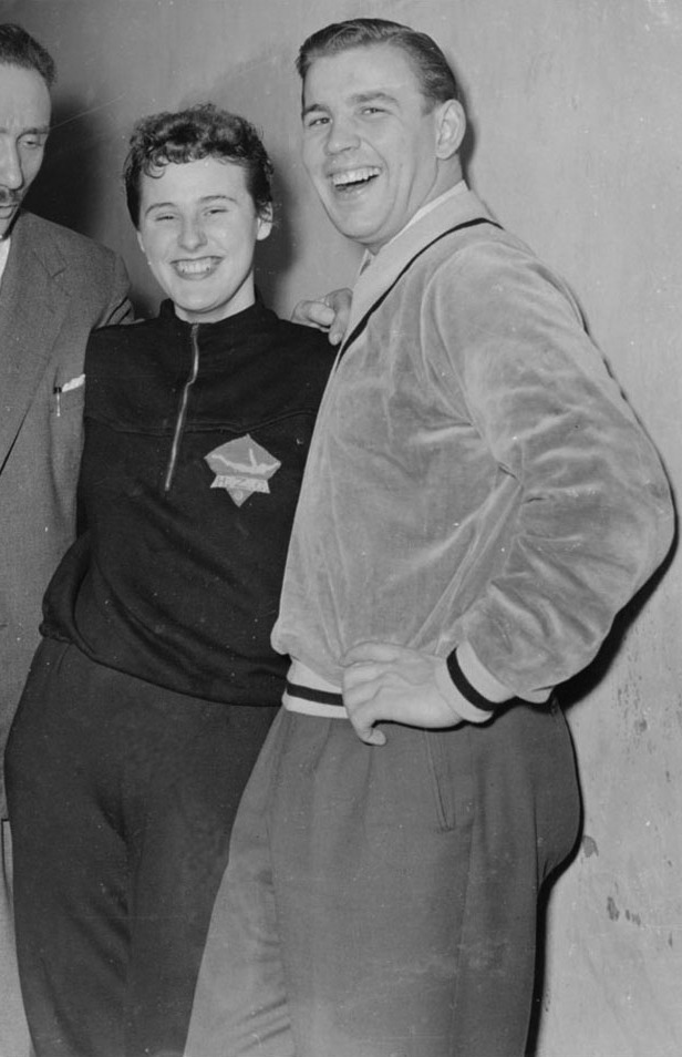 V.l.n.r. zwemster Rita Vonk, trainer Frits Happel, zwemster Geertje Wielema en zwemmer Wim de Vreng, 10 januari 1954 Foto Ben van Meerendonk / AHF, collectie IISG, Amsterdam